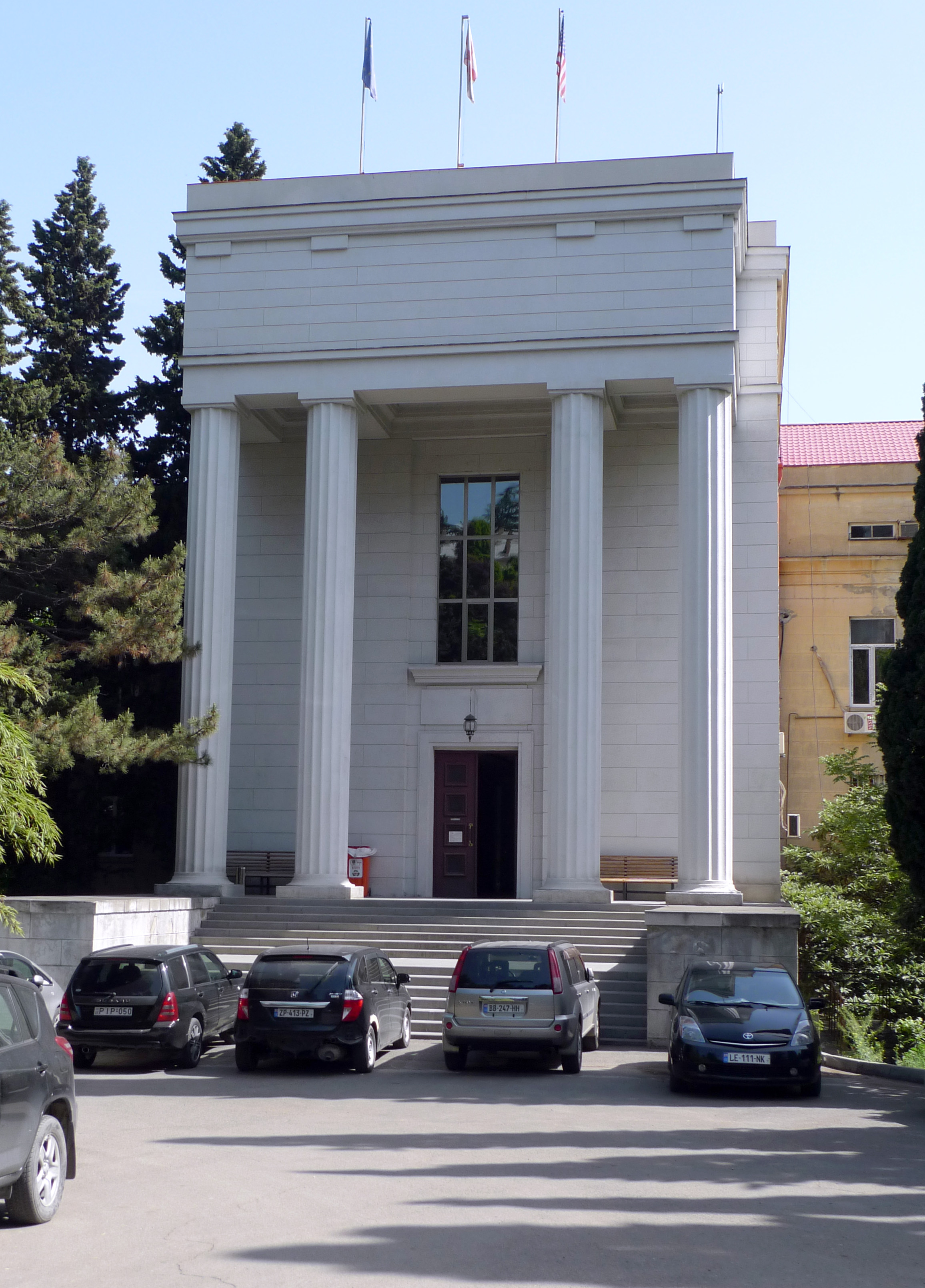 Das Eliava-Institut für Bakteriophagen, Mikrobiologie und Virologie wurde 1936 gegründet und ging aus einem vom Mikrobiologen Georgi Eliava 1923 in Tiflis eingerichteten bakteriologischen Labor hervor. Es gilt als bedeutendes Zentrum der Phagen-Forschung und -Therapie mit sieben wissenschaftlichen Abteilungen. Im historischen Hauptgebäude ist ein kleines Museum zur Geschichte der Phagen-Forschung in Georgien untergebracht.